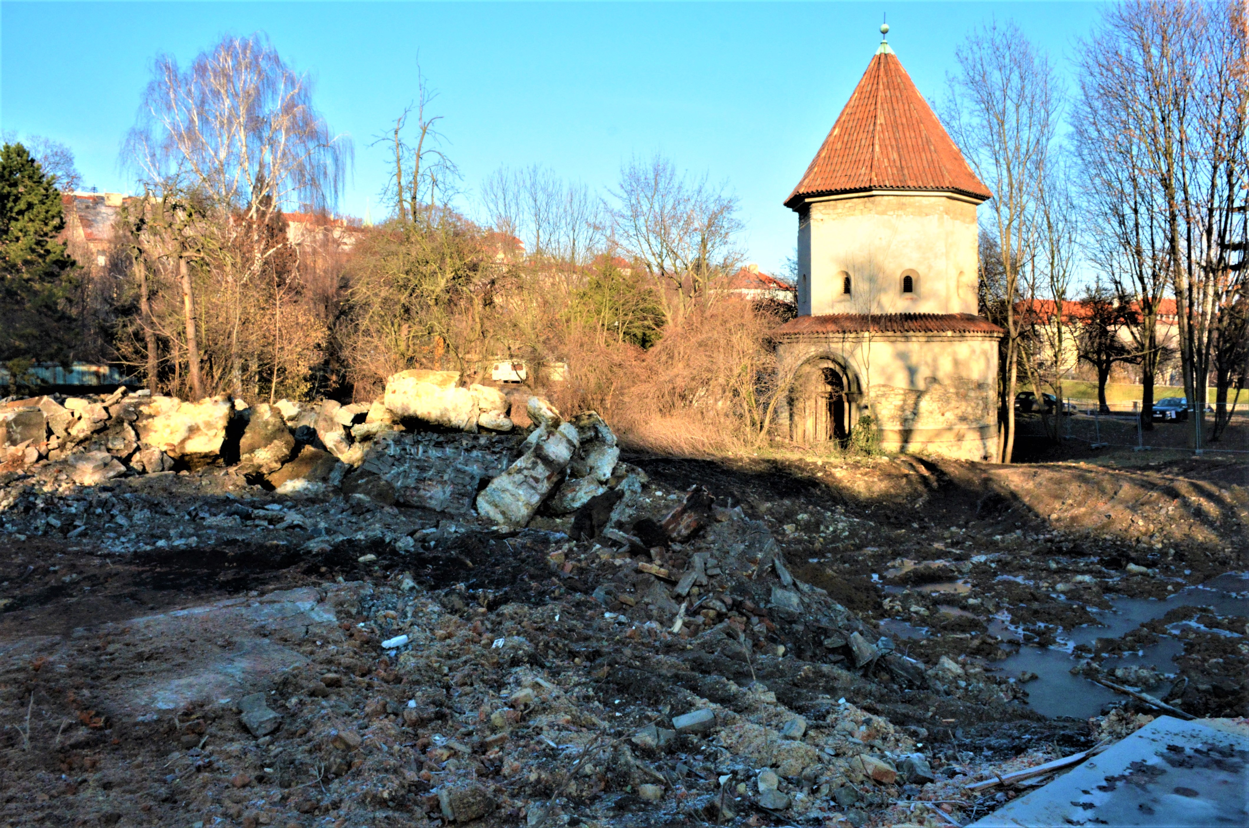 Parcela po bývalém Břevnovském mrakodrapu, Radimova č. 447/8, Břevnov, 169 00 Praha 6, v pozadí Kaple Panny Marie Altöttinské.